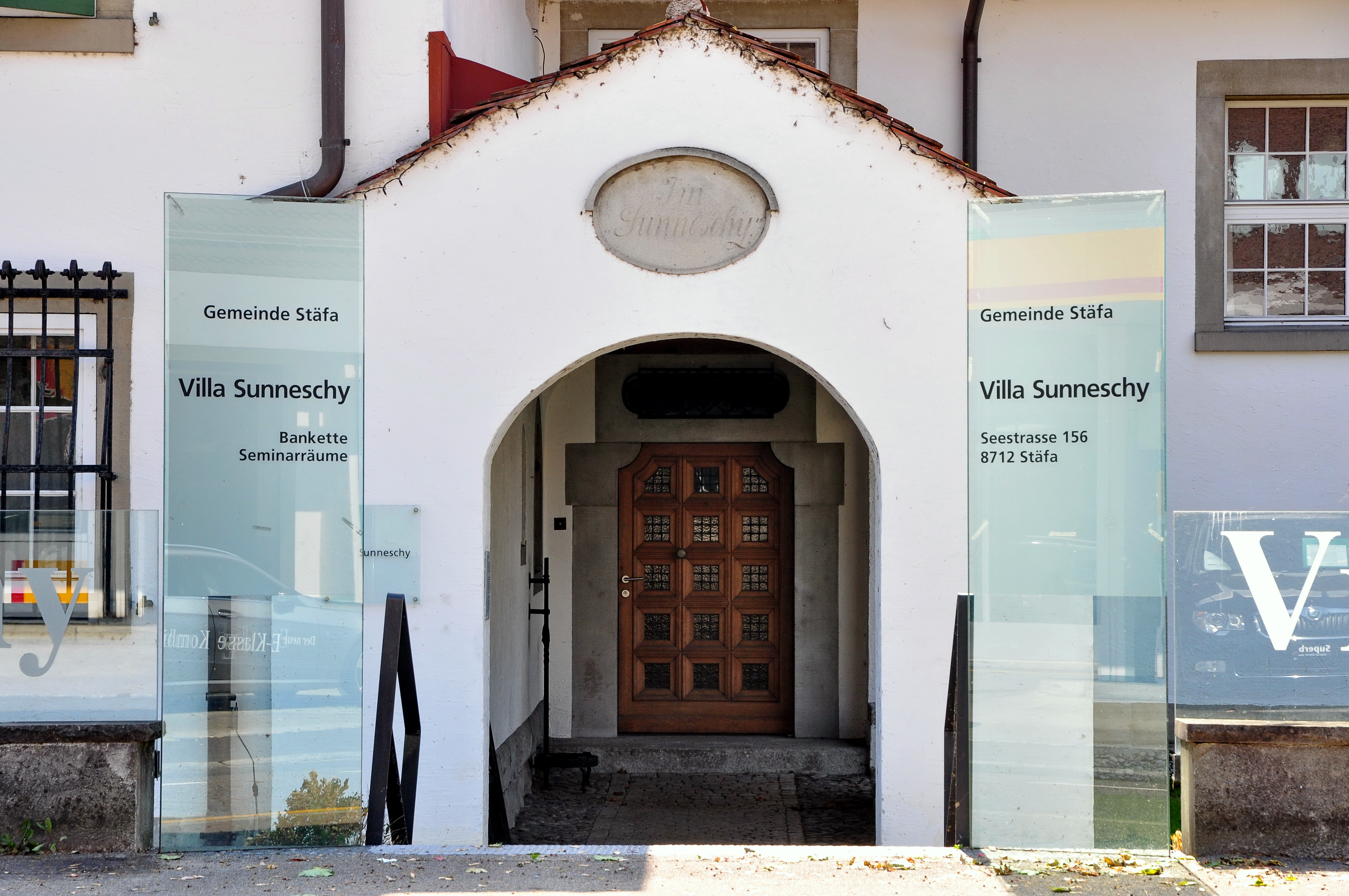 Villa (im) Sunneschy, Seestrasse 156 in Kehlhof-Stäfa (Switzerland)